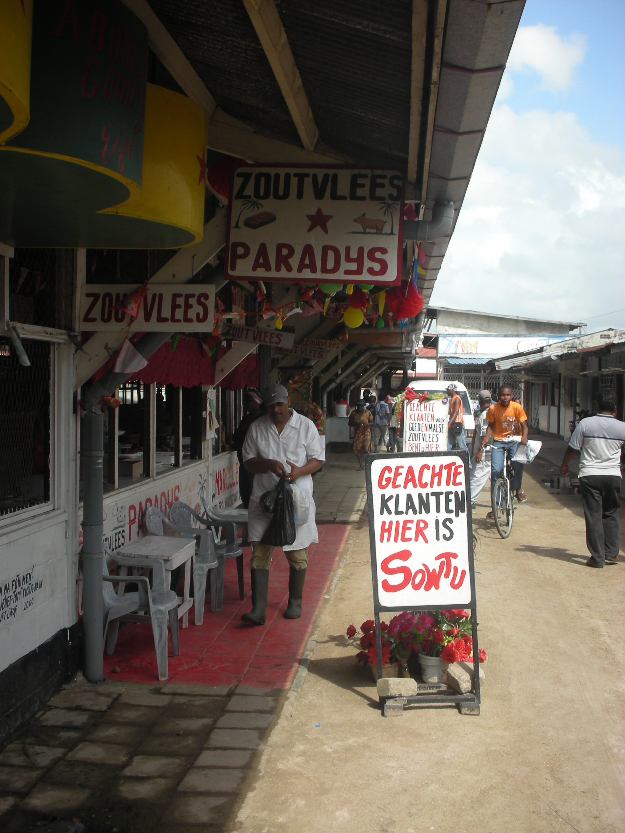 Butcher Paramaribo market